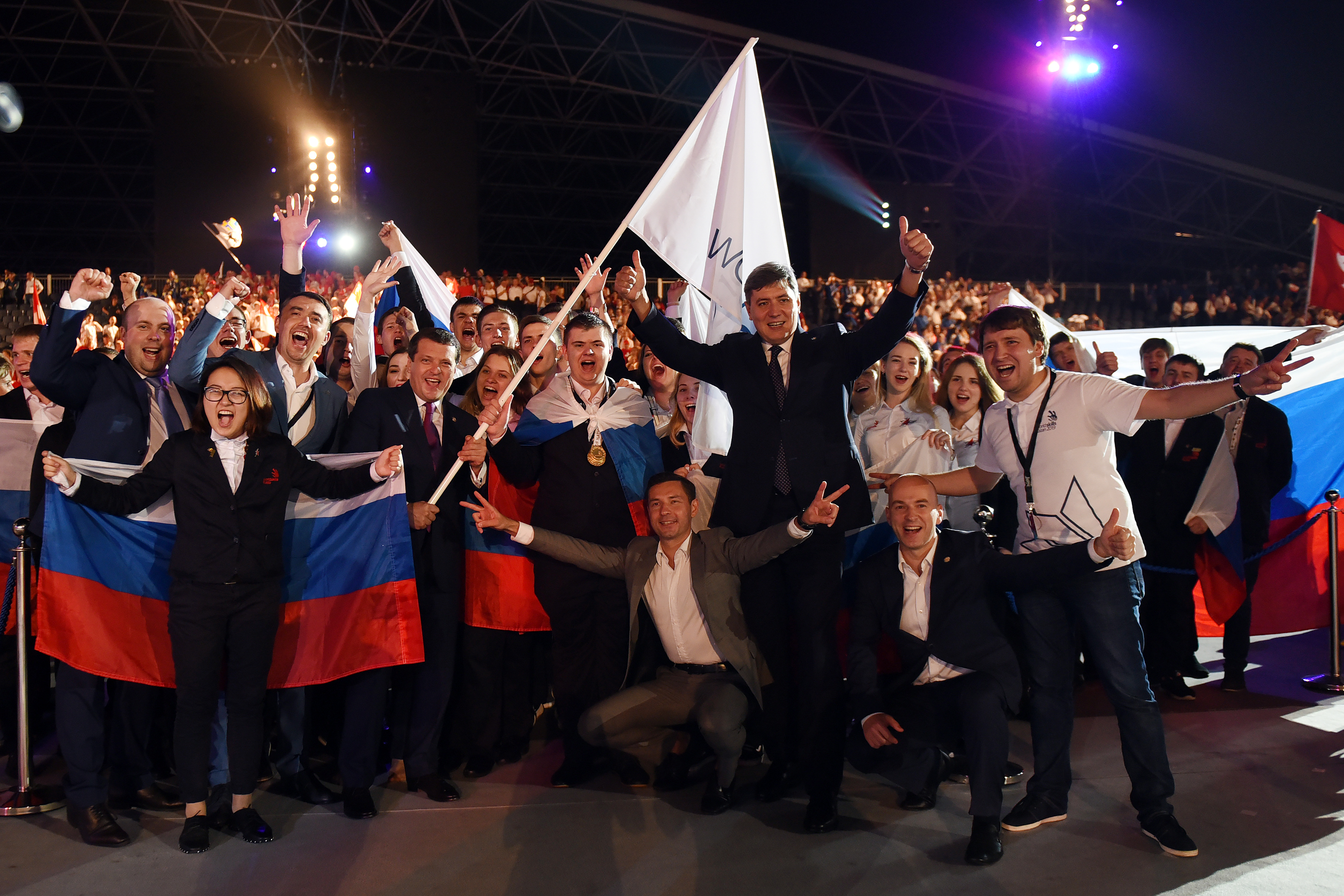 Флаг движения WorldSkills передан Российской Федерации, которая в 2019 году примет в городе Казани 45-ый чемпионат по профессиональному мастерству. Передача флага России произошла 19 октября 2017 года в Абу-Даби во время проведения 44-го чемпионата WorldSkills-2017